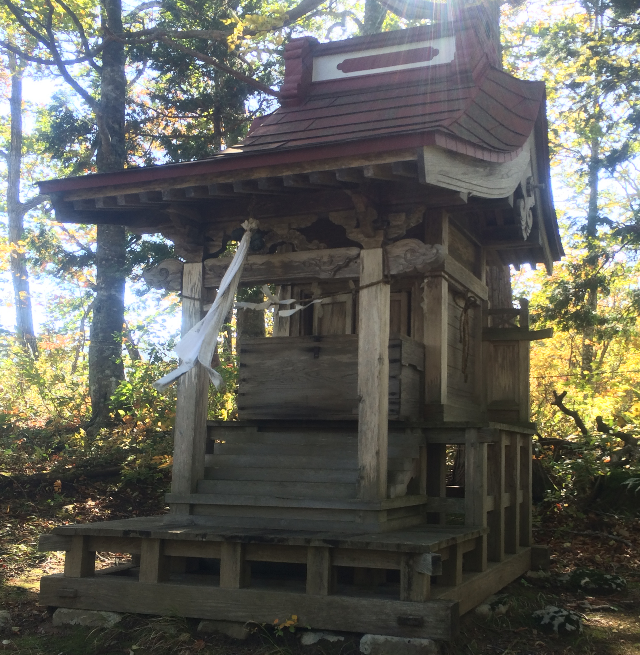 船形山神社本宮